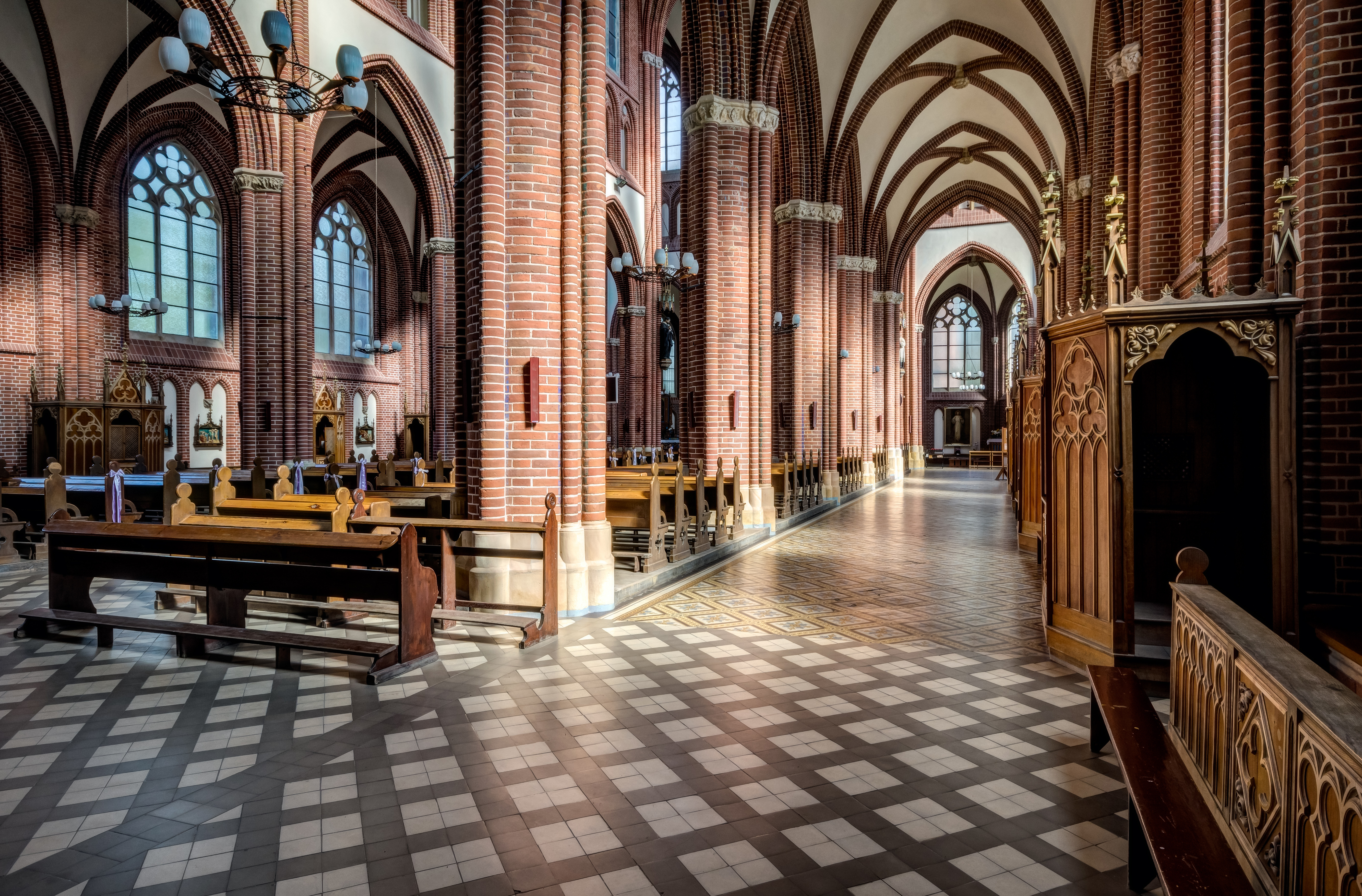 Wrocław, kościół p.w. św. Michała Archanioła, 1862-1871